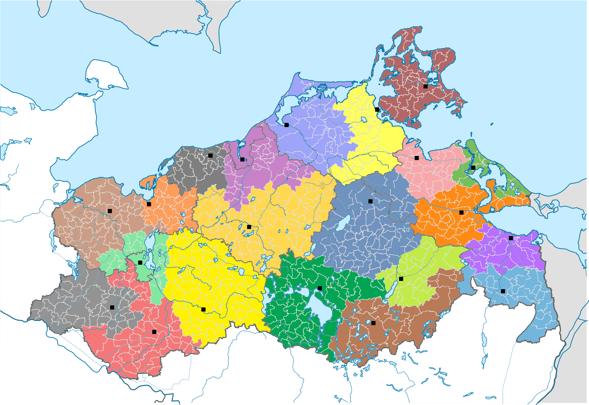 Karte der Amtsgerichtsbezirke in Mecklenburg-Vorpommern vor der am 6. Oktober 2014 in Kraft getretenen Gerichtsstrukturreform Bezirk des Landgerichtes Schwerin: Amtsgericht Grevesmühlen Amtsgericht Schwerin Amtsgericht Hagenow Amtsgericht Ludwigslust Amtsgericht Wismar Amtsgericht Parchim Bezirk des Landgerichtes Rostock: Amtsgericht Bad Doberan Amtsgericht Rostock Amtsgericht Güstrow Bezirk des Landgerichtes Stralsund: Amtsgericht Ribnitz-Damgarten Amtsgericht Stralsund Amtsgericht Bergen auf Rügen Amtsgericht Greifswald Amtsgericht Anklam Amtsgericht Wolgast Bezirk des Landgerichtes Neubrandenburg: Amtsgericht Waren (Müritz) Amtsgericht Demmin Amtsgericht Neustrelitz Amtsgericht Neubrandenburg Amtsgericht Ueckermünde Amtsgericht Pasewalk